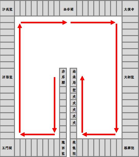 中文（台灣）: 打馬圖路線